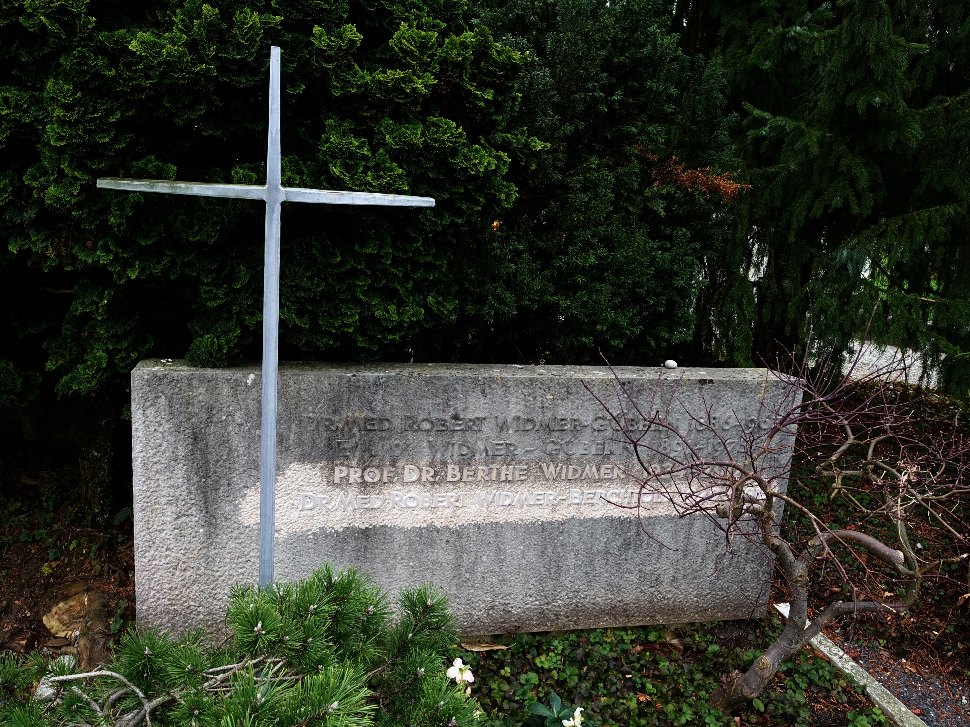 Berthe Widmer (1924–2012) Historikerin, Dr.phil., Prof. für ma. Kulturgeschichte und mittellat. Philologie. Familien Grab auf dem Friedhof Friedental, Stadt Luzern